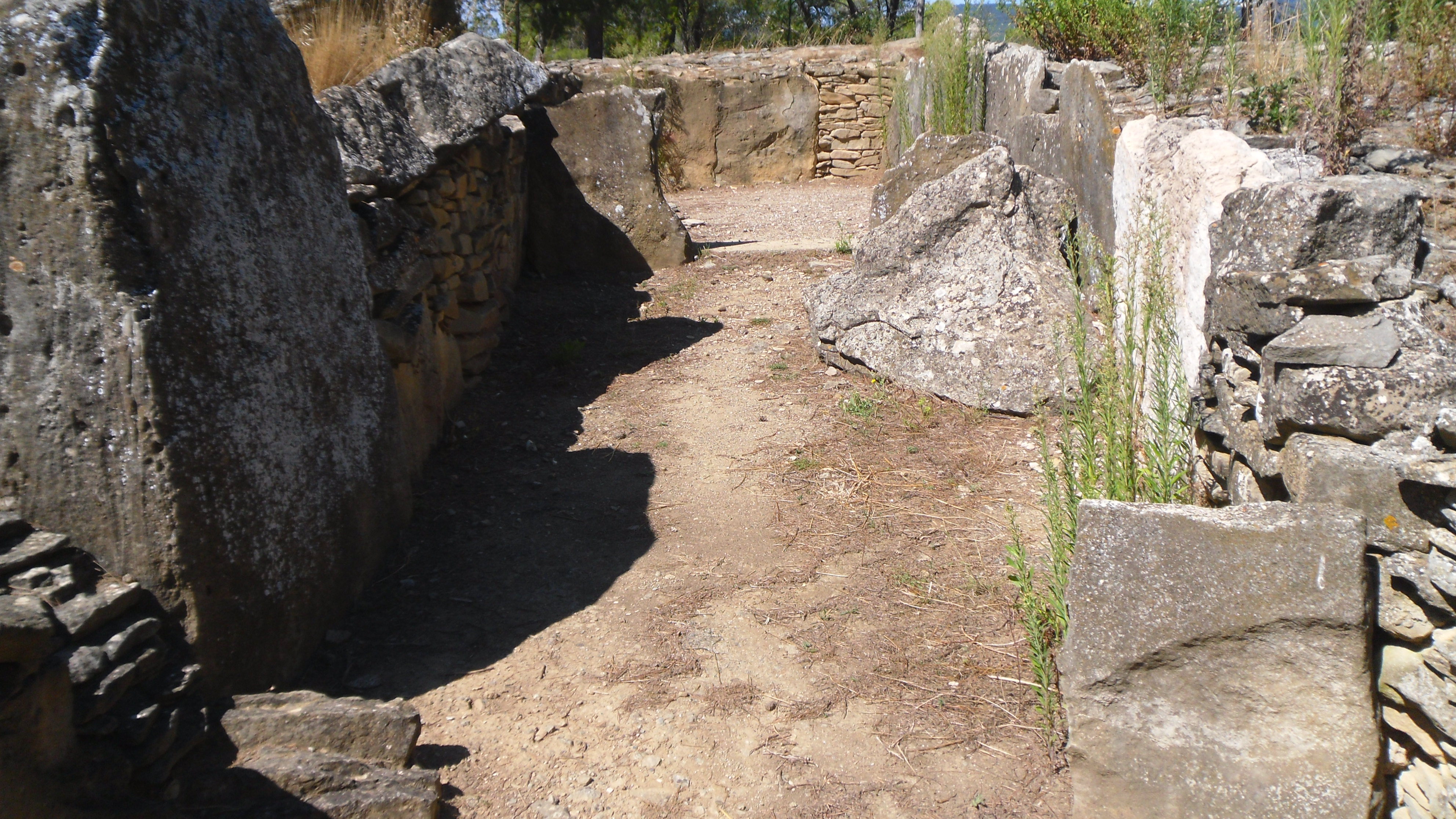 Allée couverte de Saint-Eugène (domaine de Russol, Laure-Minervois